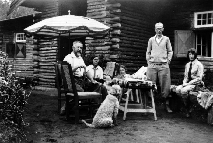 Foto. Portret van Henk Spies met de familie S.W.G. Gisius, bewoners van de "Smeroe Hoeve", in Ranoe Pani